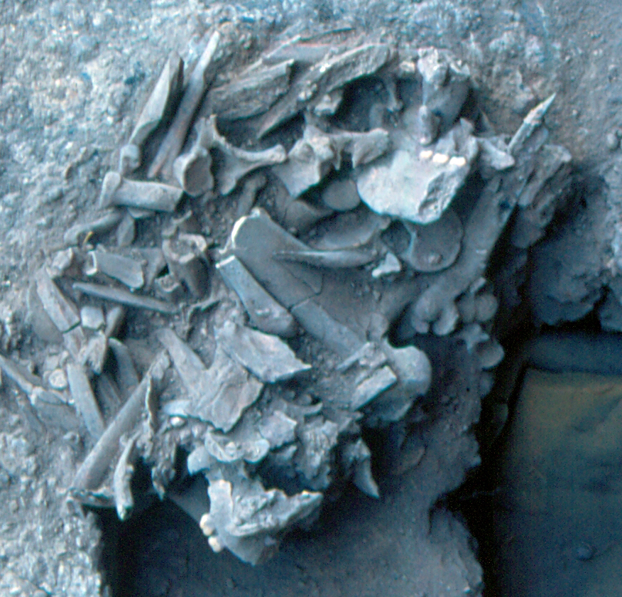 Lapa do Santo - Sepultamento 11 - Fotos de campo da Exposição 05. A Lapa do Santo é um sítio arqueológico localizado na região de Lagoa Santa em Minas Gerais. Apresenta um rico registro da cultura material dos grupos que habitaram o Brasil central durante Holoceno Inicial, Médio e Final. Dezenas de sepultamentos humanos foram encontrados na Lapa do Santo. O Sepultamento 11 era composto pelos ossos de um único indivíduo adulto que foram enterrados numa cova circular e que não apresentavam lógica anatômica aparente. Inúmeros ossos longos apresentam fraturas não cicatrizadas (perimortem). Não foi encontrada nenhuma estrutura de pedras sobre o esqueleto. A escavação do sepultamento é feita por 'exposições'. Aqui observam-se os ossos presentes na exposição 05. Todas as fotos de exposição de sepultamento da Lapa do Santo tem um croqui correspondente onde todos os ossos aparentes são devidamente identificados.